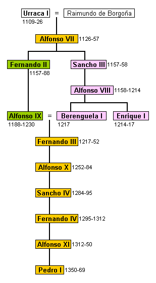 Árbol genealógico de los reyes de Castilla y de León de la casa de Borgoña.